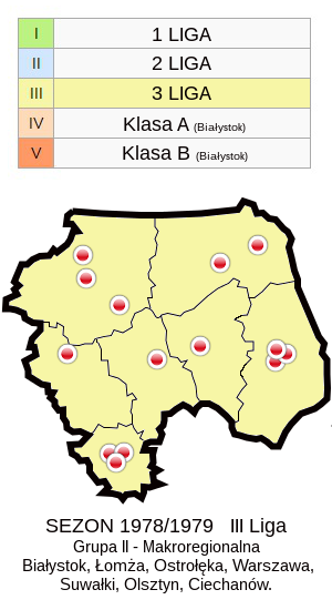 Jagiellonia w sezonie 1978/79 - mapa